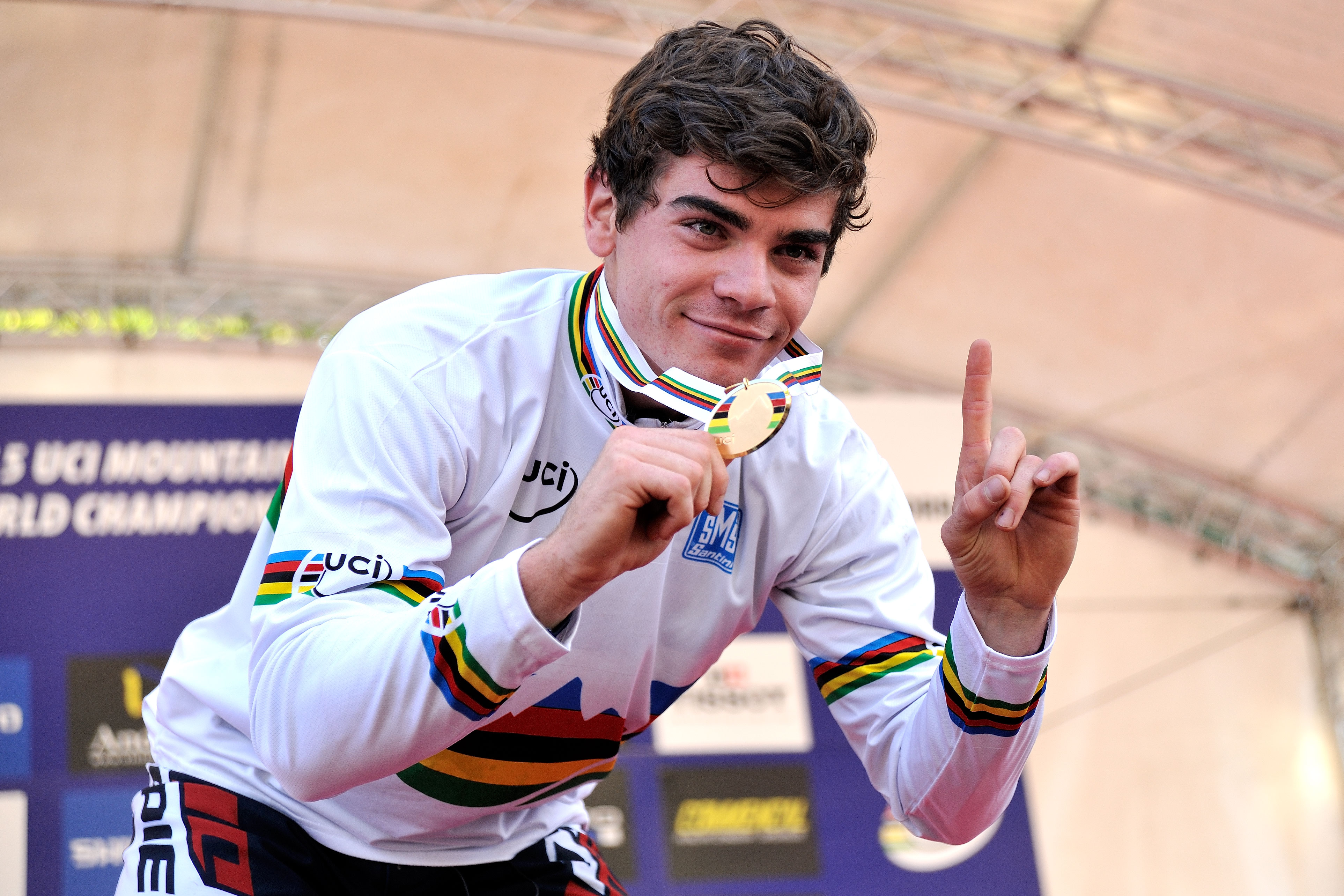 Loïc Bruni remporte les Championnats du Monde 2015 de VTT de descente à Vallnord dns la catégorie Elite